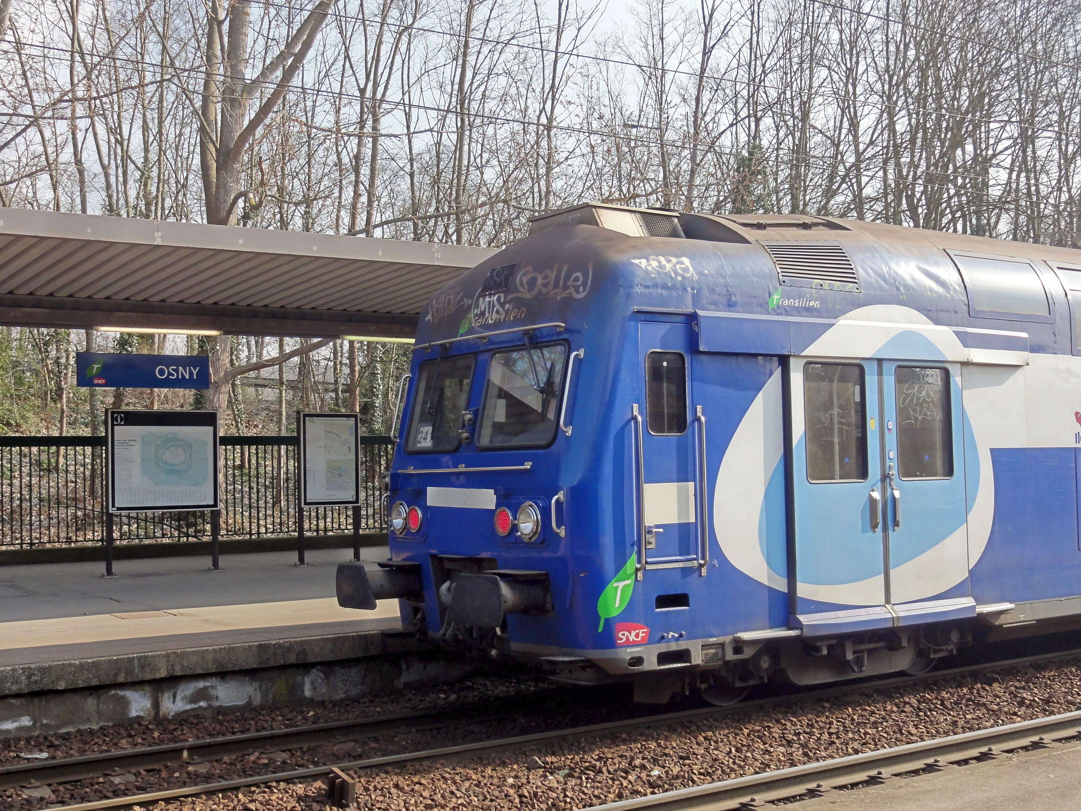 Train à destination de Paris au départ.